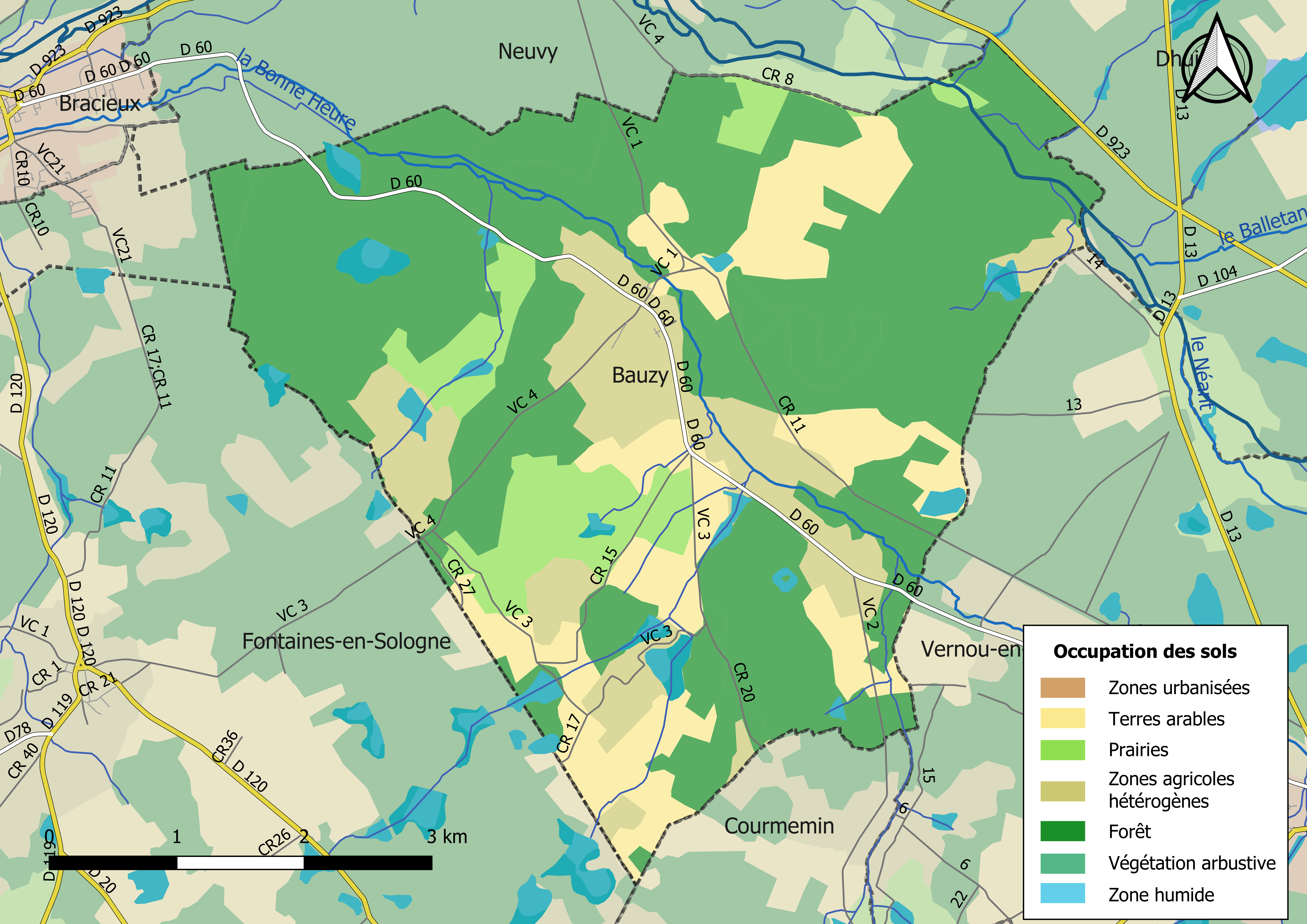 Carte des infrastructures et de l’occupation des sols en 2018 de la commune de Bauzy (France).